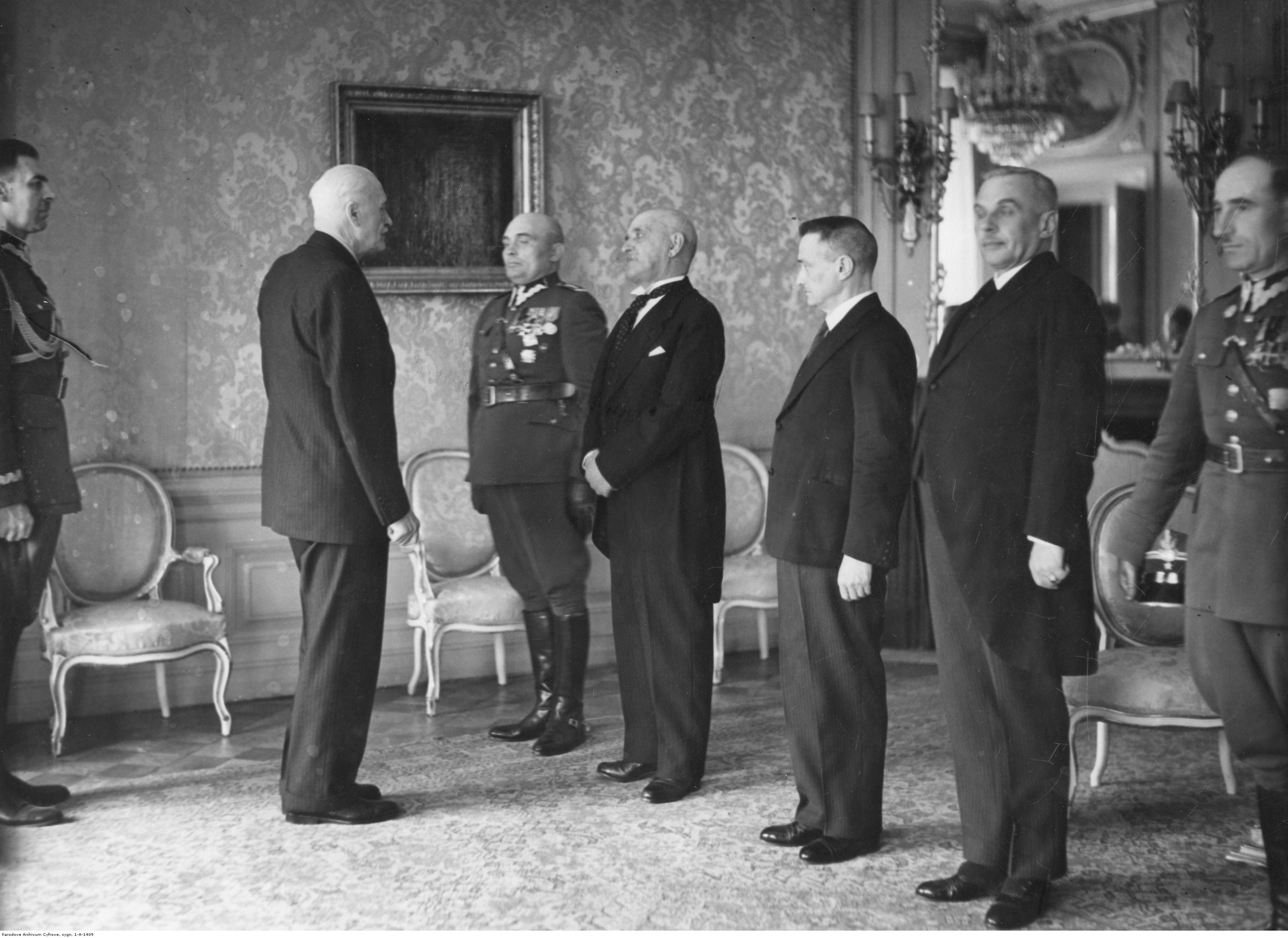 Delegacja 84 Pułku Strzelców Poleskich na audiencji u prezydenta RP Ignacego Mościckiego (drugi z lewej). Widoczni m.in. pułkownik Józef Zawiślak, senator Roman Skirmuntt, generał Kazimierz Schally (z lewej). Koncern Ilustrowany Kurier Codzienny - Archiwum Ilustracji. Sygnatura: 1-A-1409